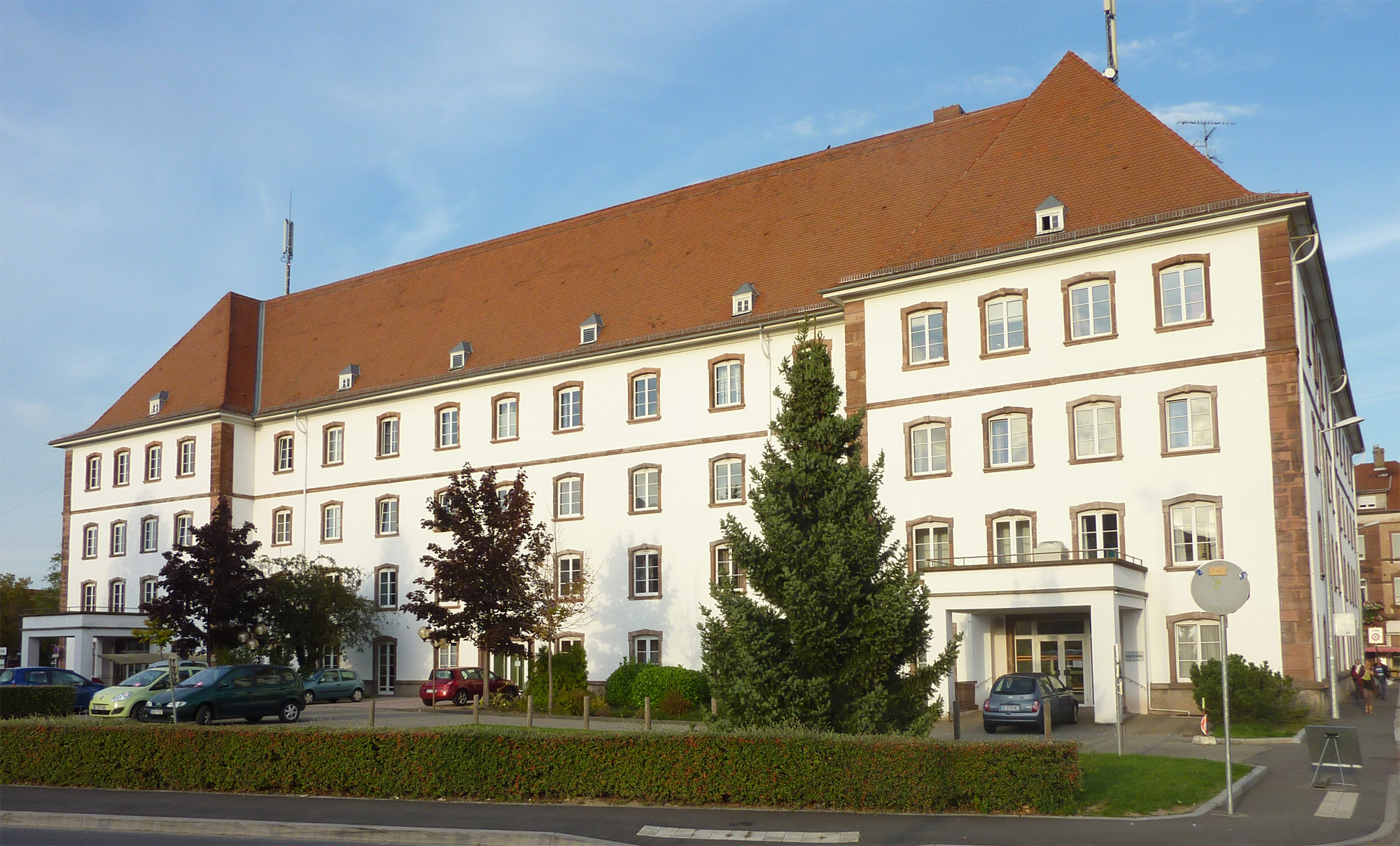 Haguenau – Maison de Retraite. Foto aus westlicher Richtung vom Parkplatz an der Rue die la Vieille Île aus. Früher ein Jesuitenkloster und danach eine Kaserne, steht das heutige Altenheim genau an der Stelle der früheren Kaiserpfalz.